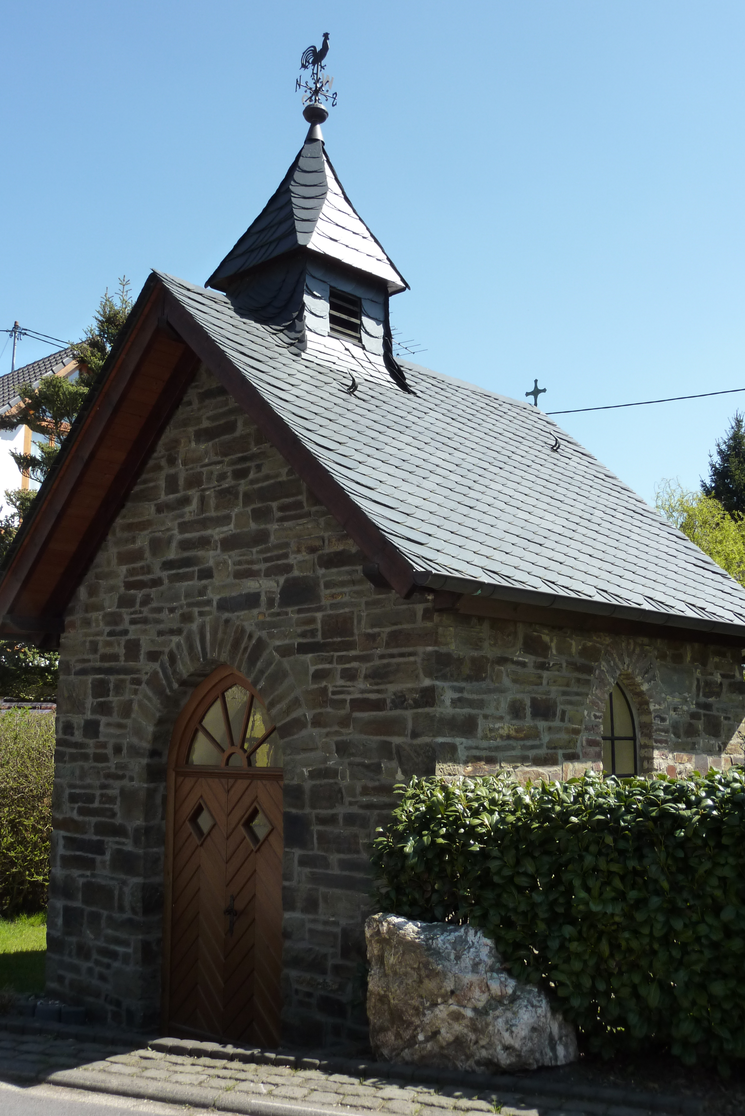 Kapelle Maria Königin des Friedens in Untervinxt, einem Ortsteil von Schalkenbach, Außenansicht